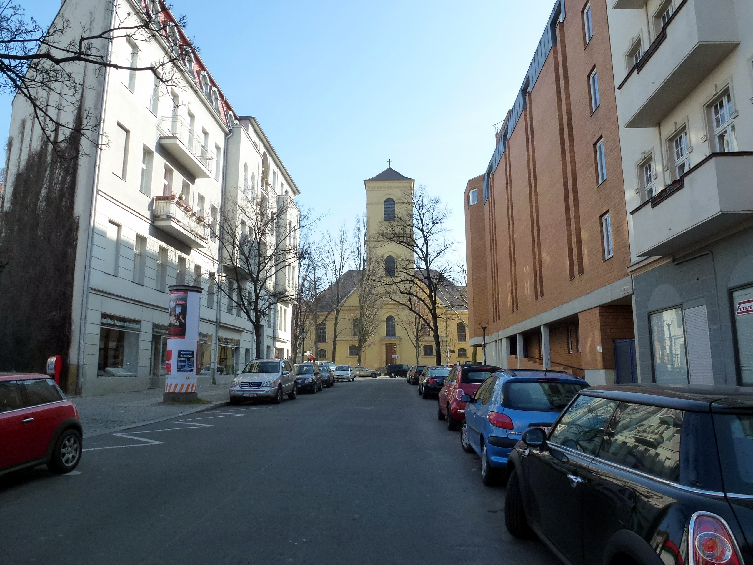 Berlin-Charlottenburg Schustehrusstraße Blick zur Luisenkirche